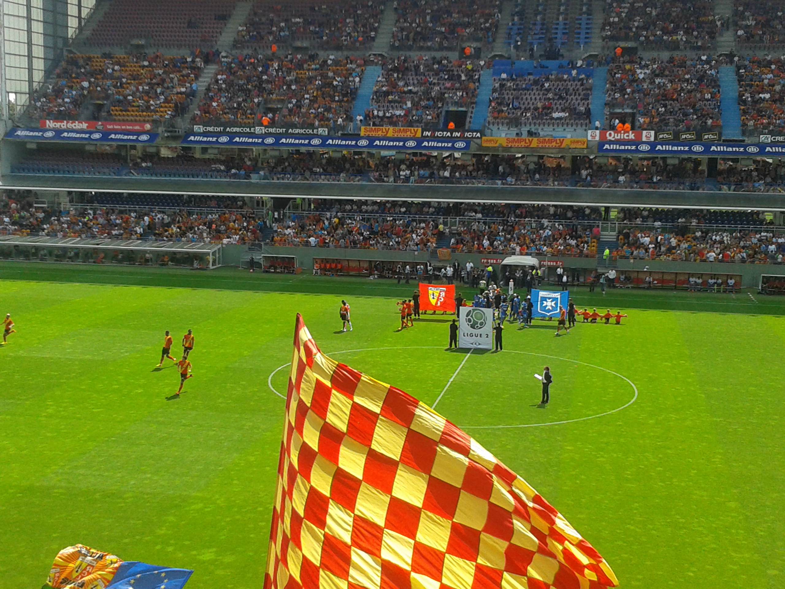 RC Lens - AJ Auxerre, le 17 août 2013, au Stade Bollaert-Delelis, pour le championnat de France de football de Ligue 2 (deuxième division française).